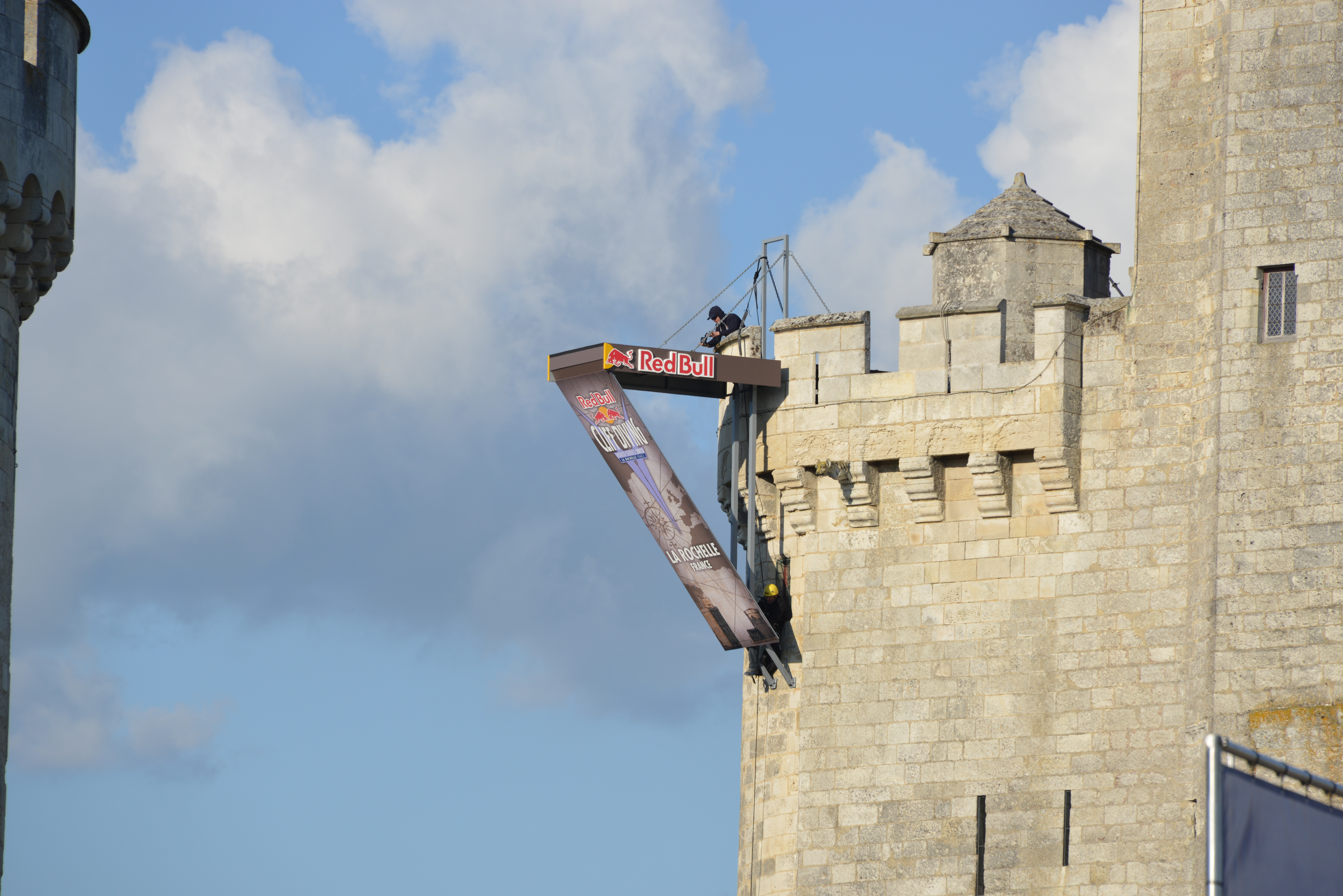 Cette photographie concerne le premier arrêt (première étape) effectué à La Rochelle, fin mai 2013, du Championnat Red Bull Cliff Diving World Series 2013 (Championnat des Séries Mondiales de Plongeons Extrêmes Red Bull). La Rochelle, Charente Maritime, France.